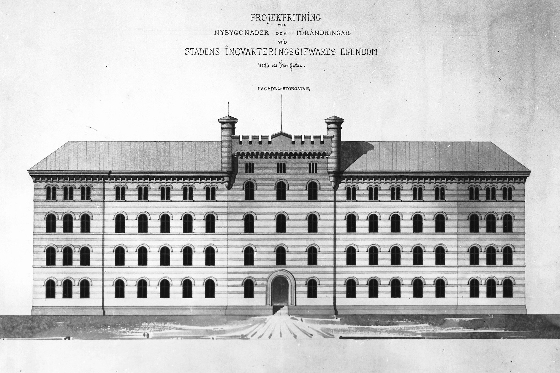 Stadens norra kasern, projekt till nybyggnad mot Storgatan